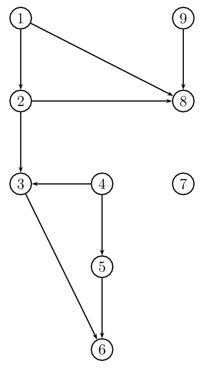 Un graphe orienté servant de support a l'article Tri Topologique